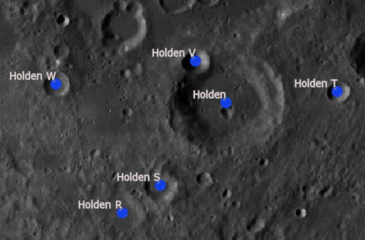 Cráter lunar Holden. Cráteres satélite. (Imagen LRO)